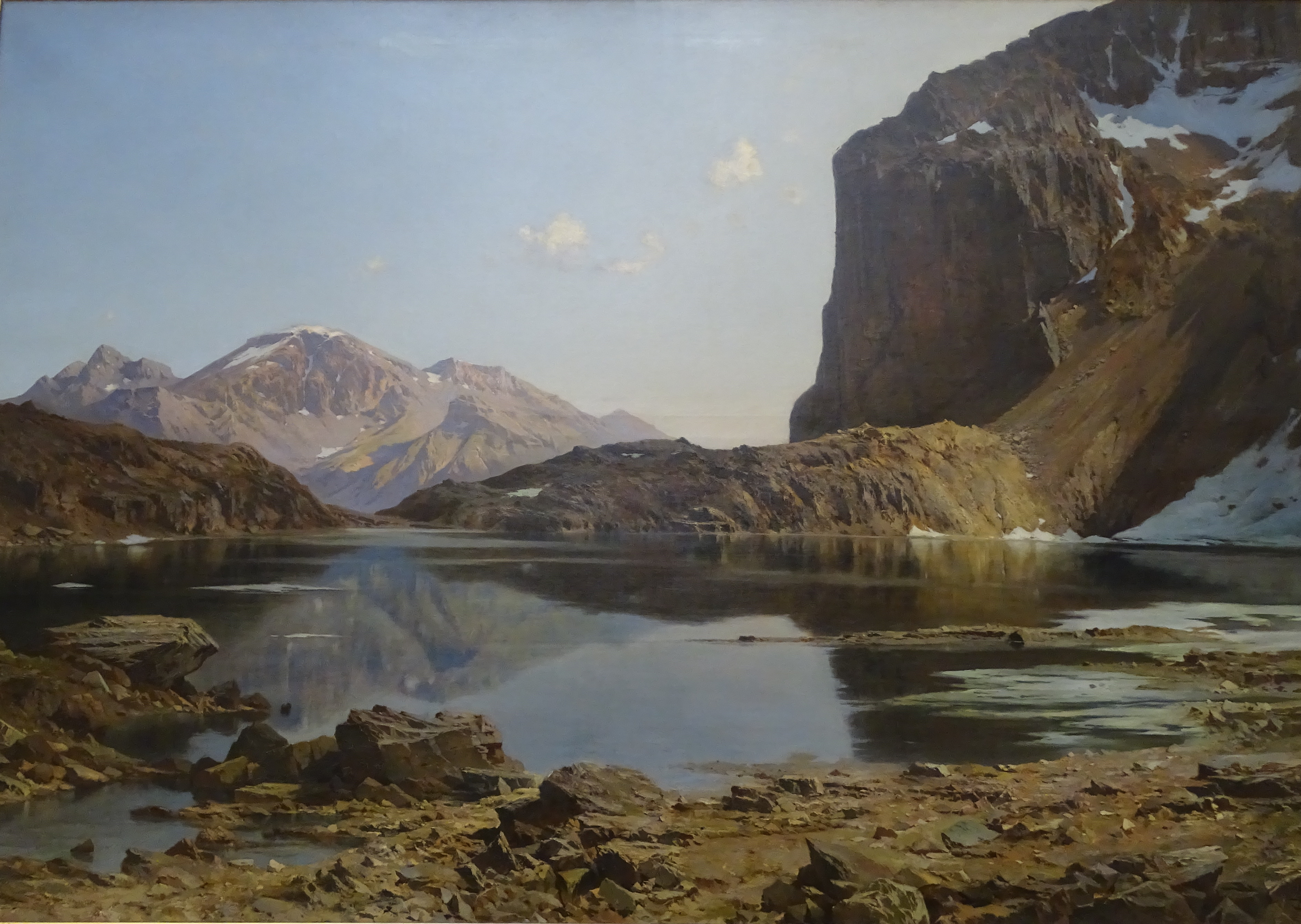 Le lac de l'Eychauda